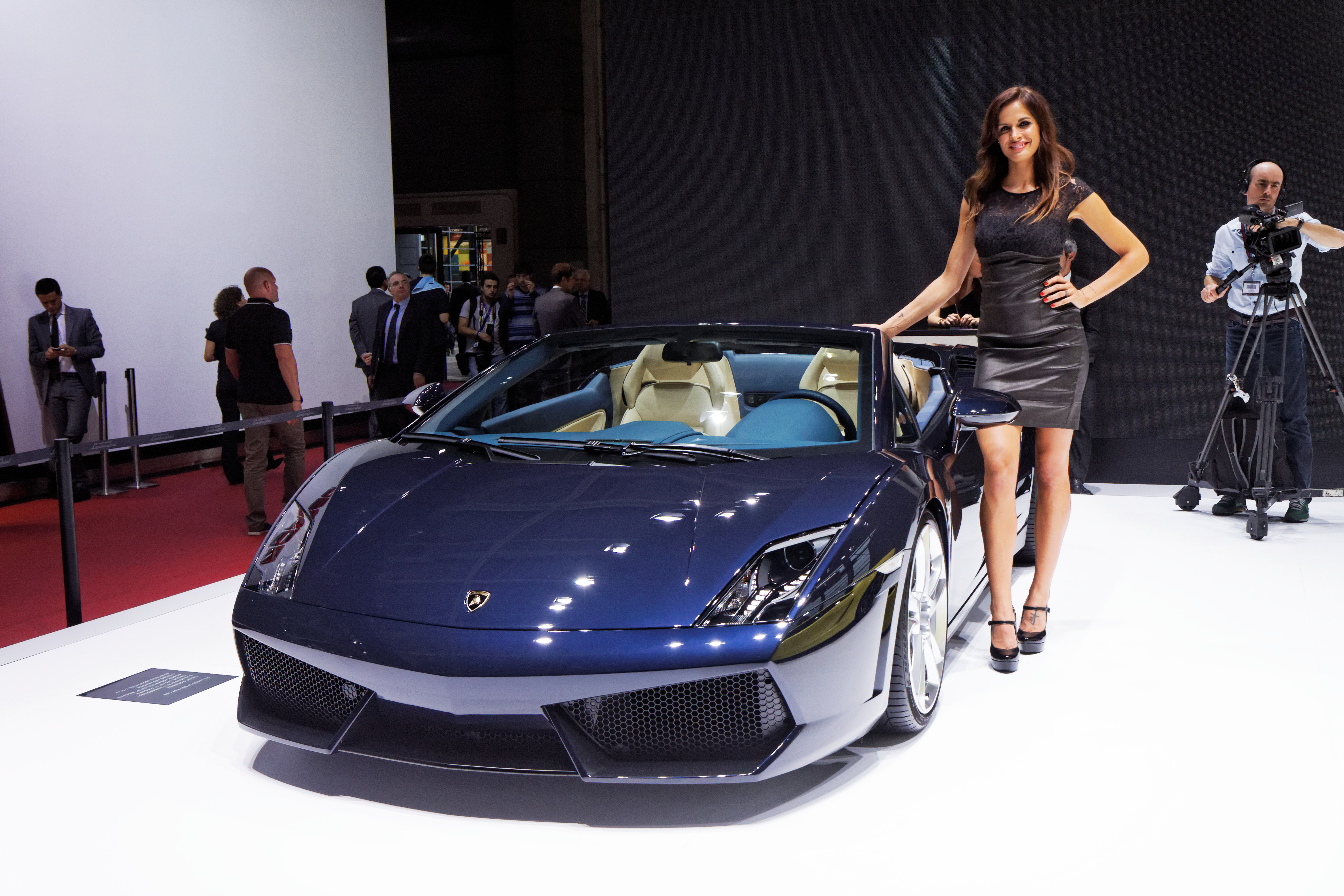 Une Lamborghini Gallardo LP 550-2 Spyder présentée lors du Mondial de l'Automobile de Paris 2012.